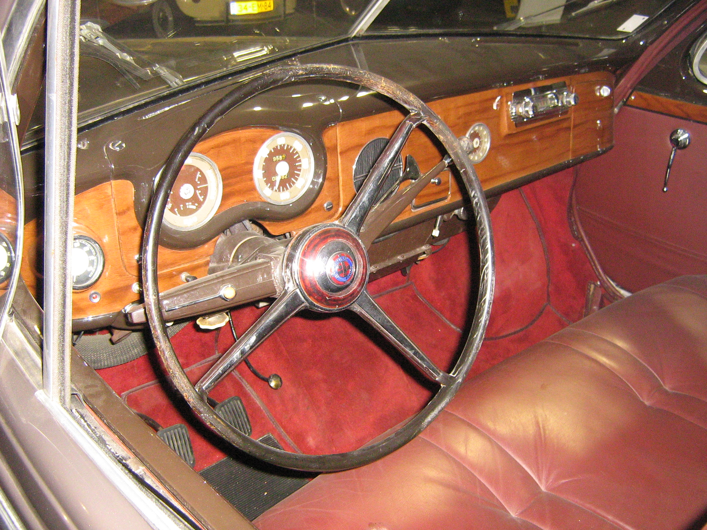 1951 Horchkiss